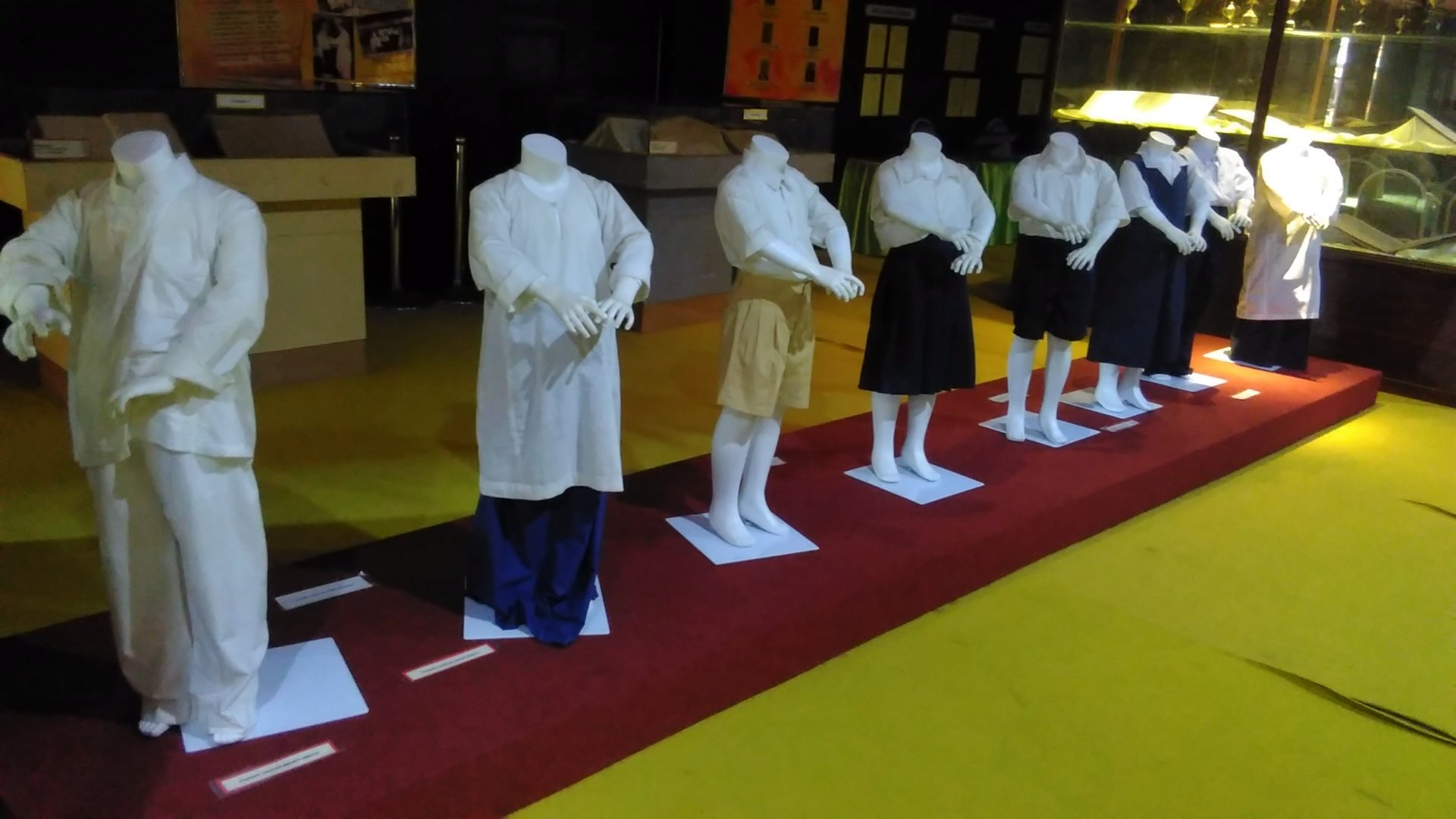 Pakaian SKS